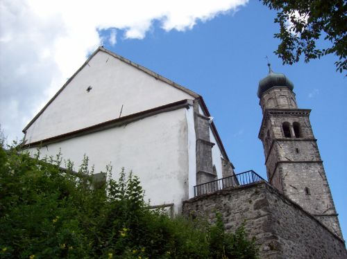 Zuglio (UD) - Pieve di San Pietro, l'attuale edificio risale al 1312 costruito su preesistenti insediamenti e con varie modifiche successive, è una delle 11 antiche Pievi della Carnia, fu sede vescovile nel medioevo.